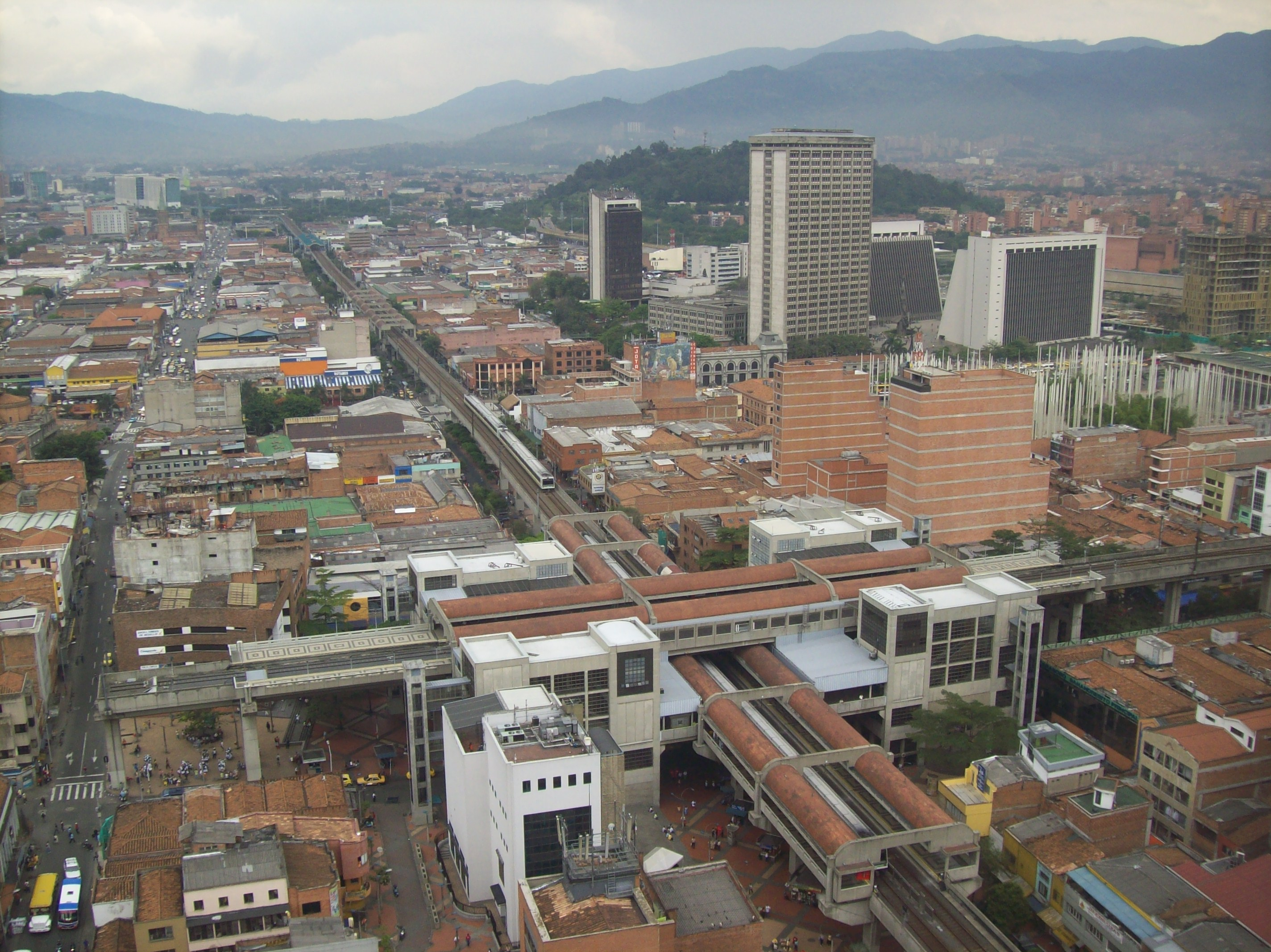 Vista de la Estación San Antonio desde el Edificio del Café, Medellín. Al fondo, el Centro Adminostrativo La Alpujarra y la Plaza de Cisneros.